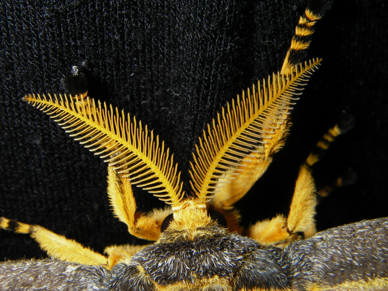 Argema mittrei, Ranomafana, Madagascar